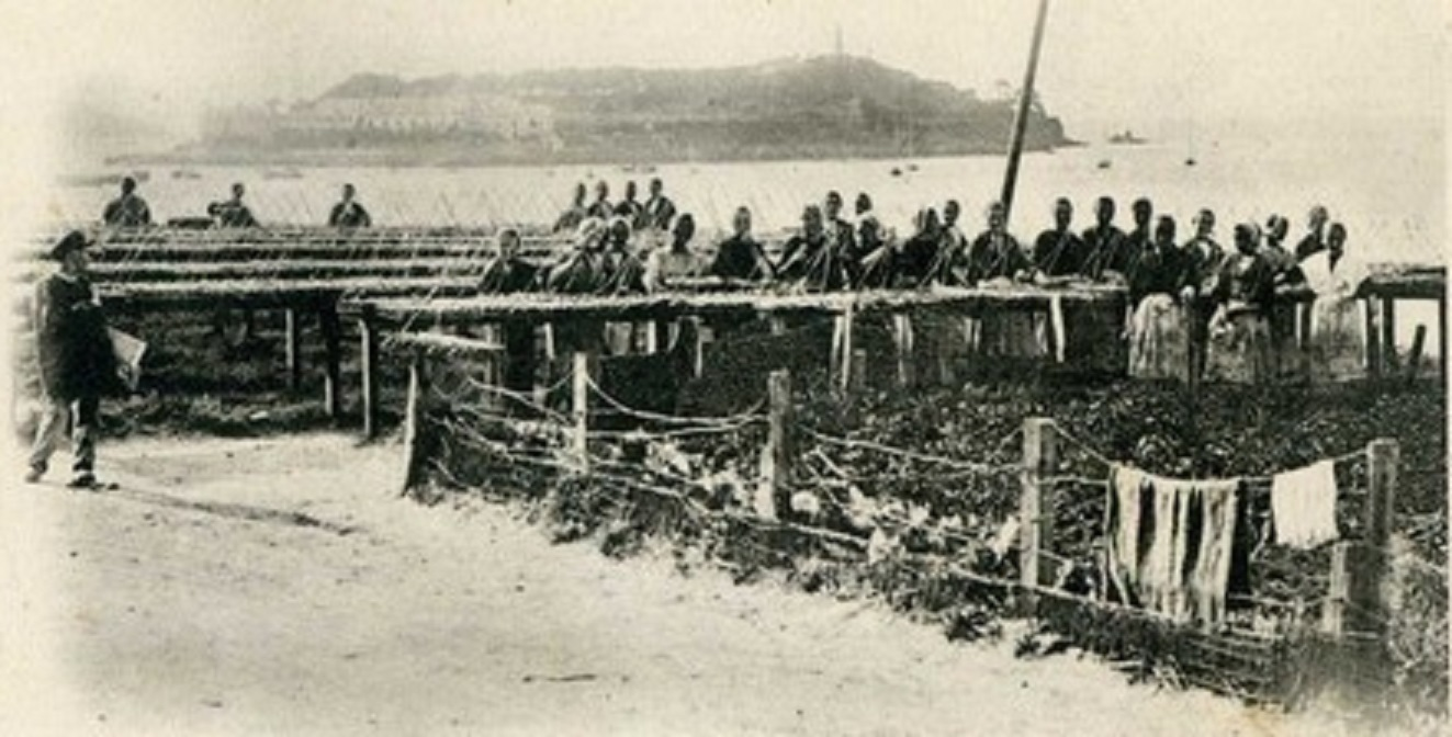 Douarnenez : Sardinières au travail vers 1900